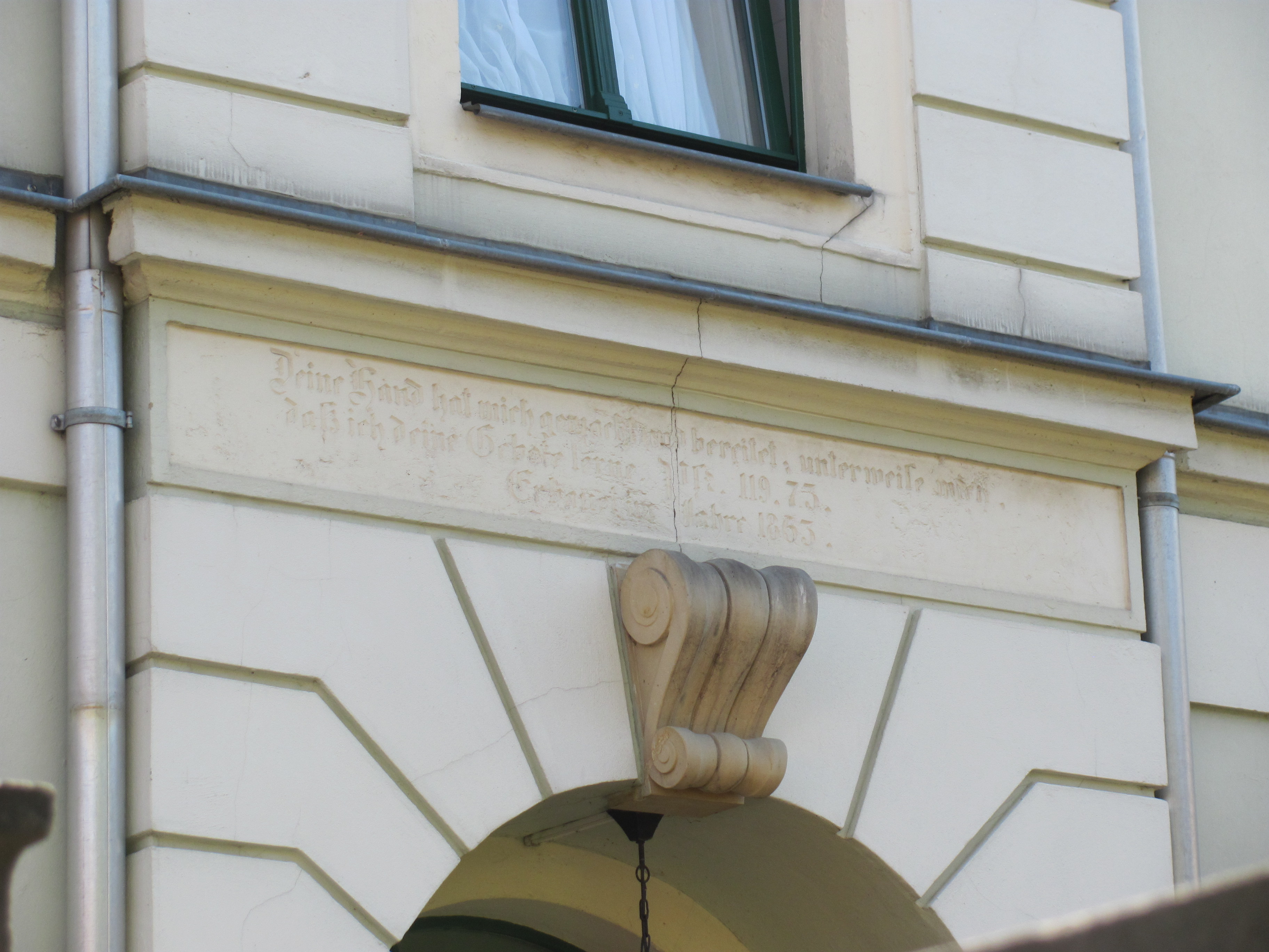 Radebeul Dorfschule Kötzschenbroda